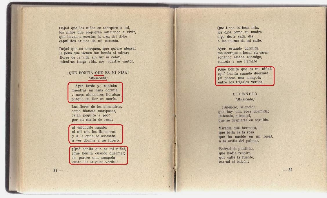 Es la prueba de que Francisco de Val compuso Qué bonita es mi niña dos años antes de la pretensión de Flores el Gaditano